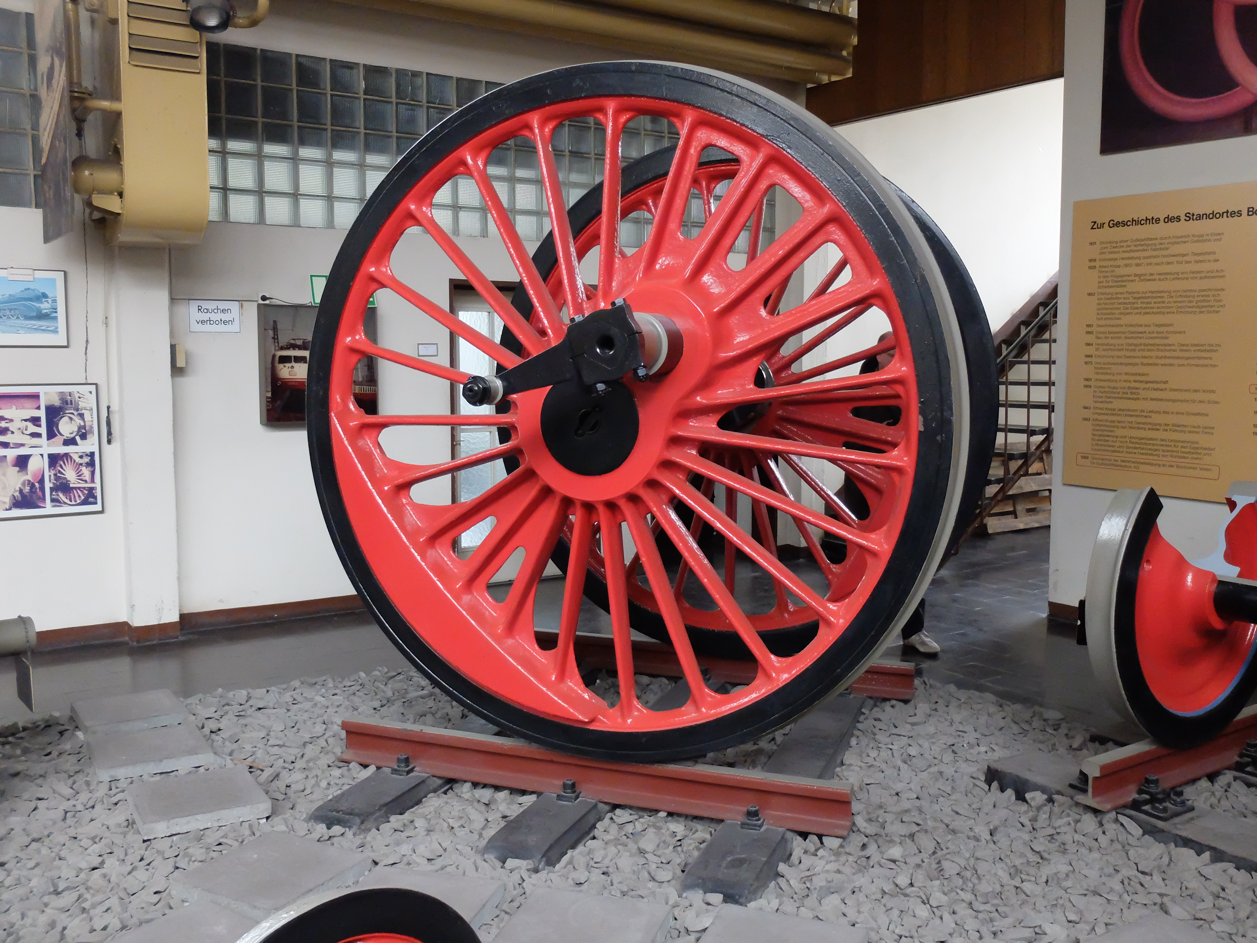 Treibradsatz der Dampflokomotiven der Baureihe 05 der Deutschen Reichsbahn aufgestellt im Werksmuseum des Bochumer Vereins.